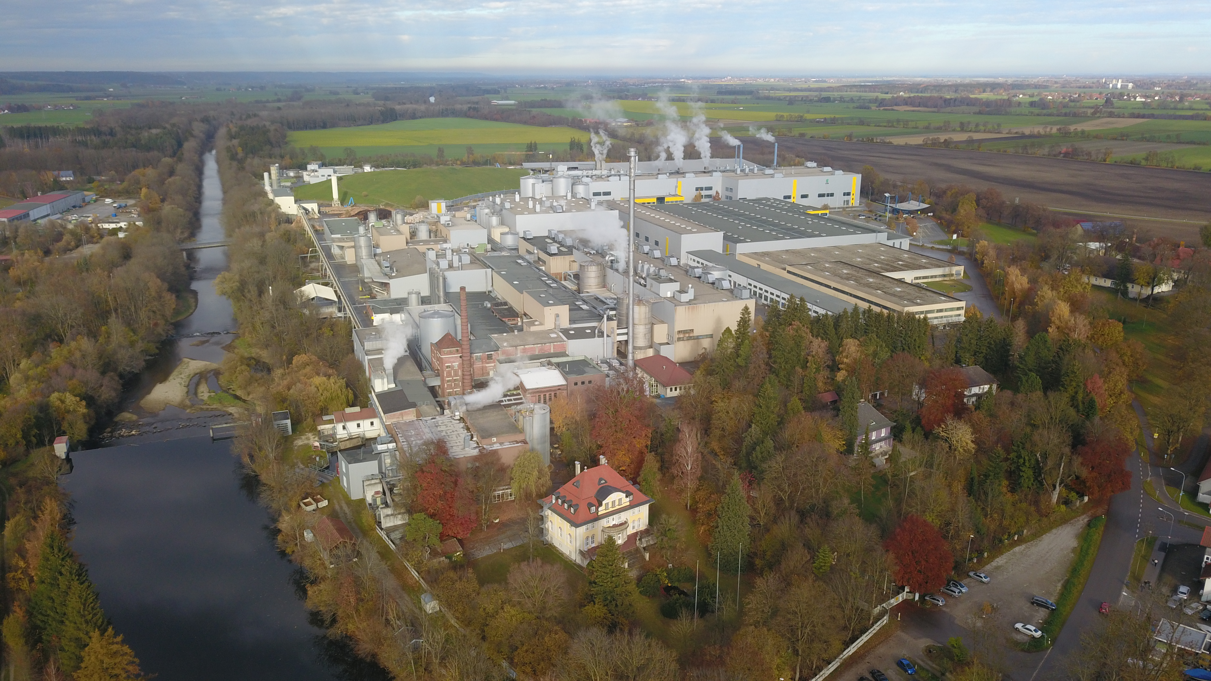 Werksgelände der UPM Ettringen mit Wertach, Wertachwehr und Gut Ostettringen